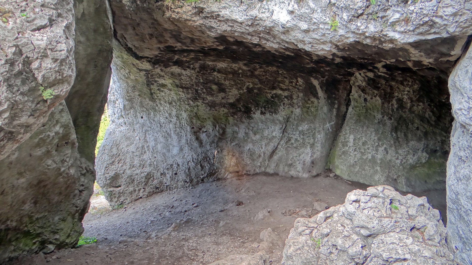 Schronisko Kazamar w Cyrku na Górze Zborów w Podlesicach